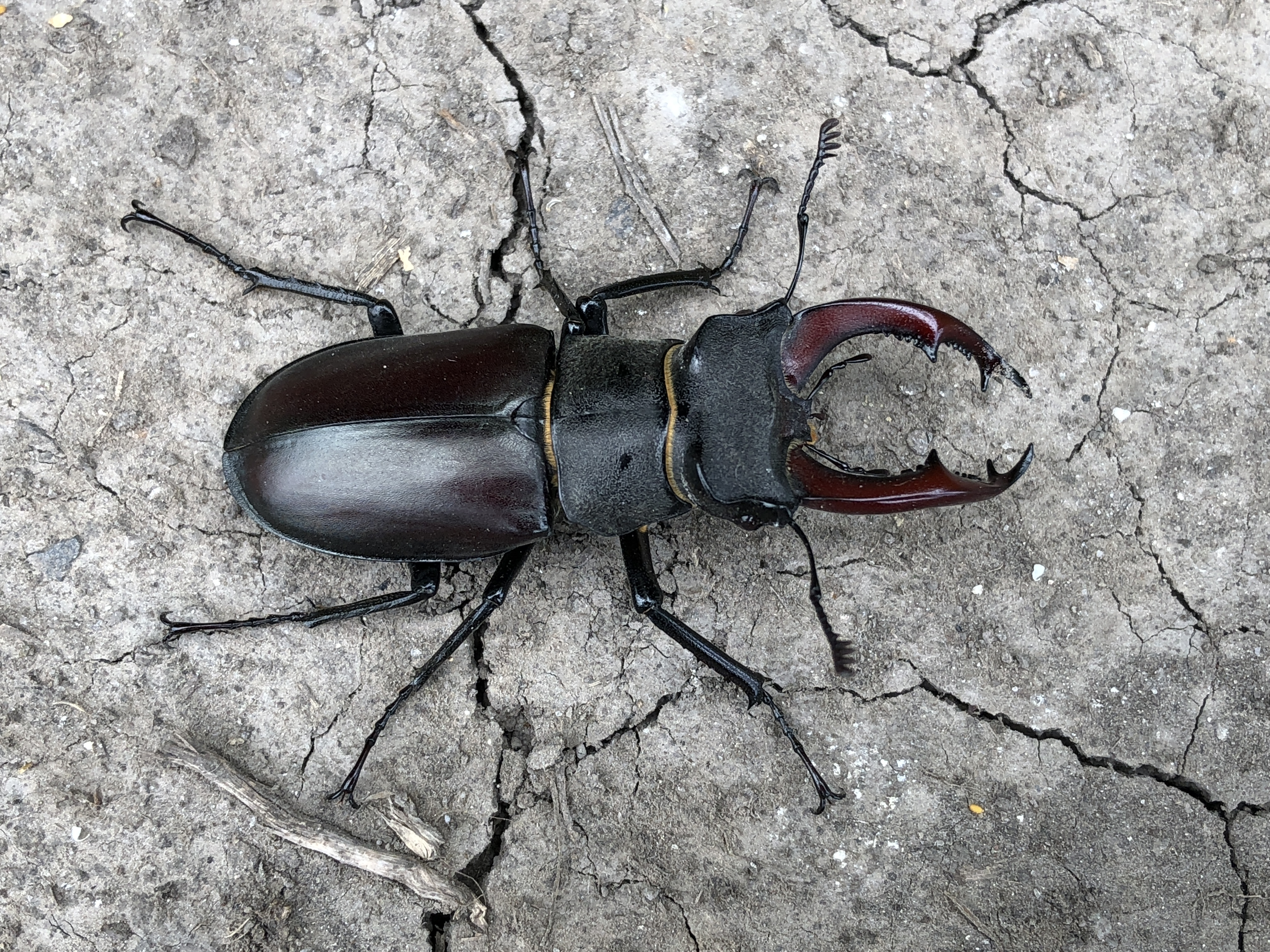 Meadow steppe, Kursk region